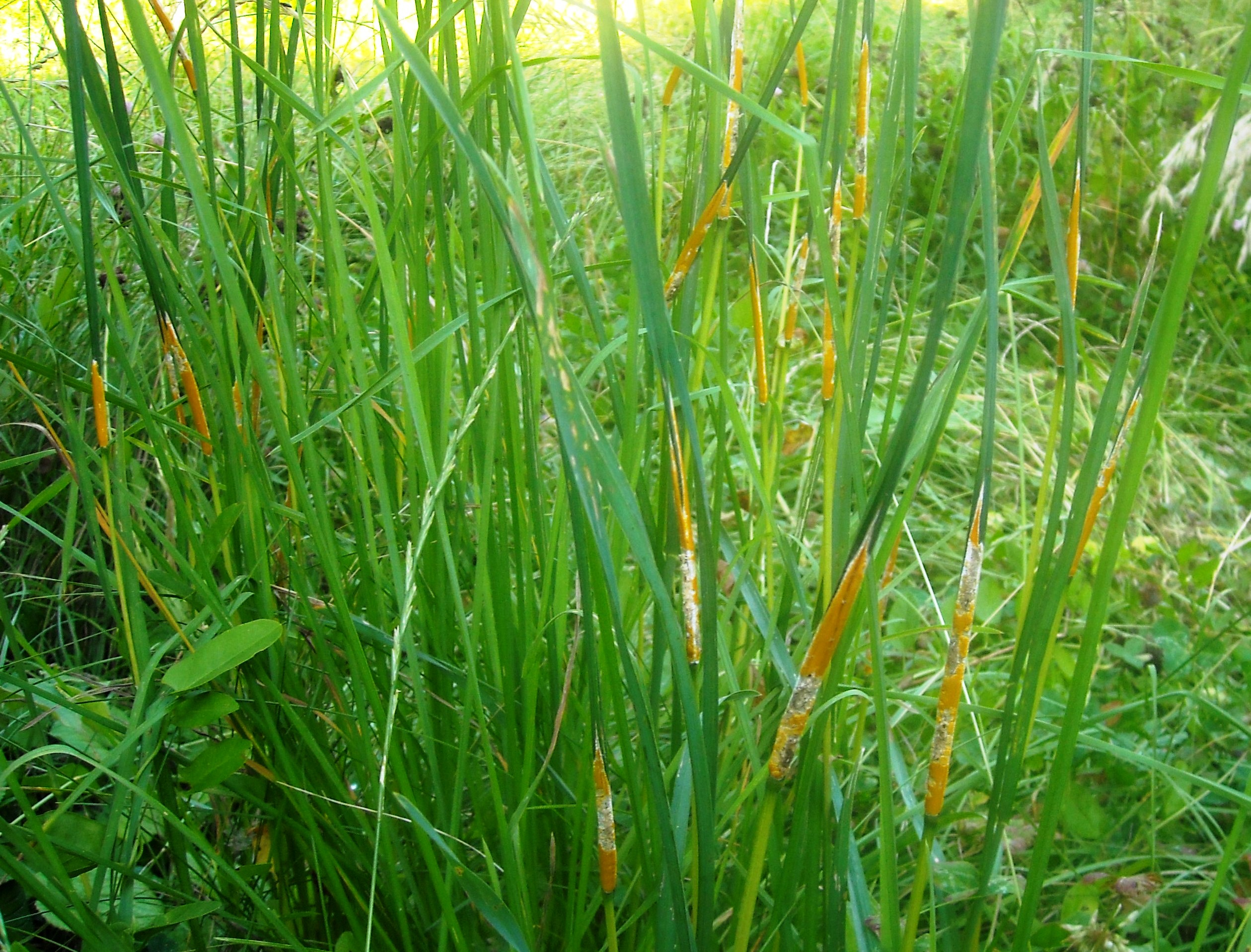 Epichloë tiphyna